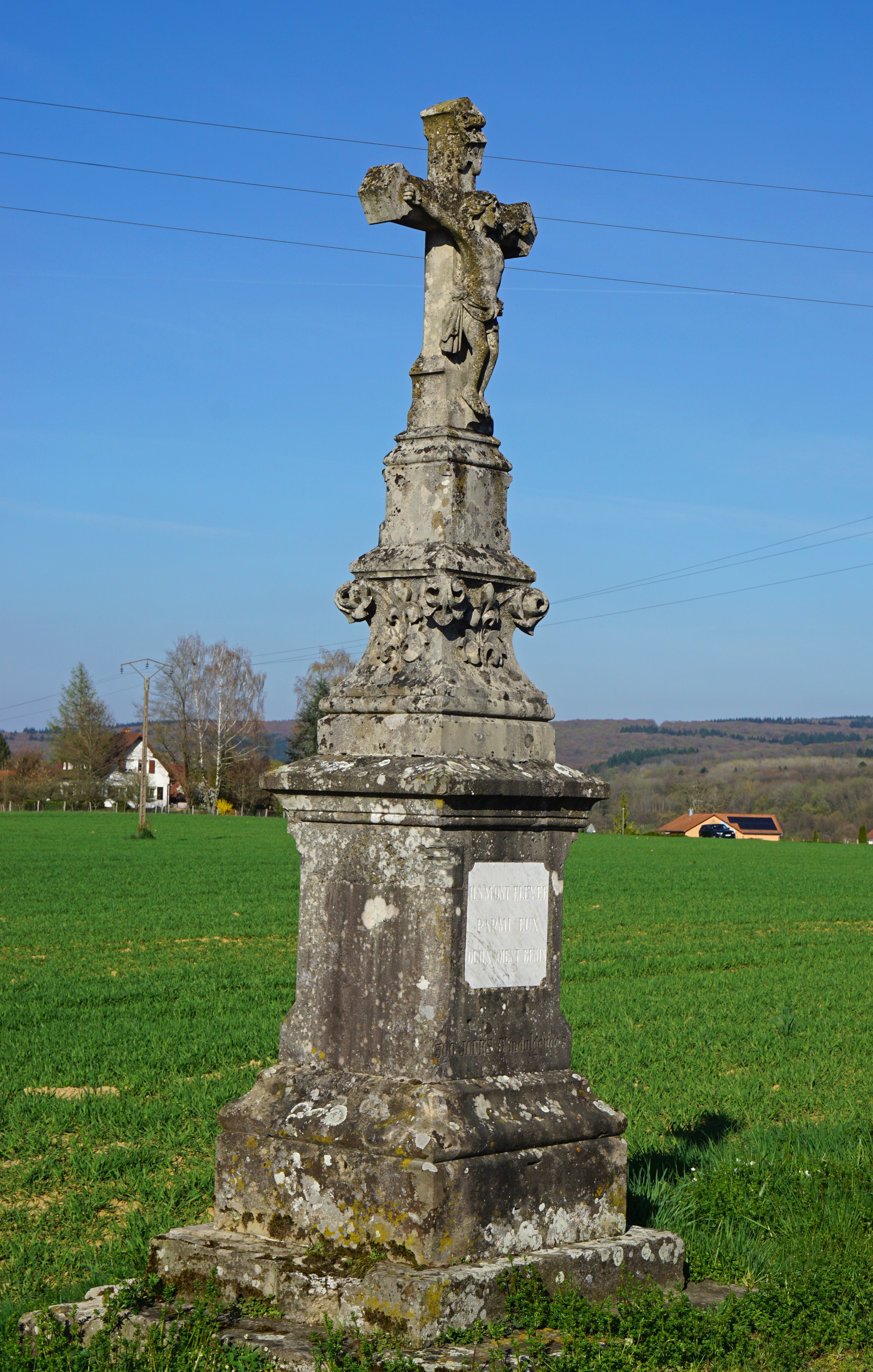 Calvaire à Andornay.